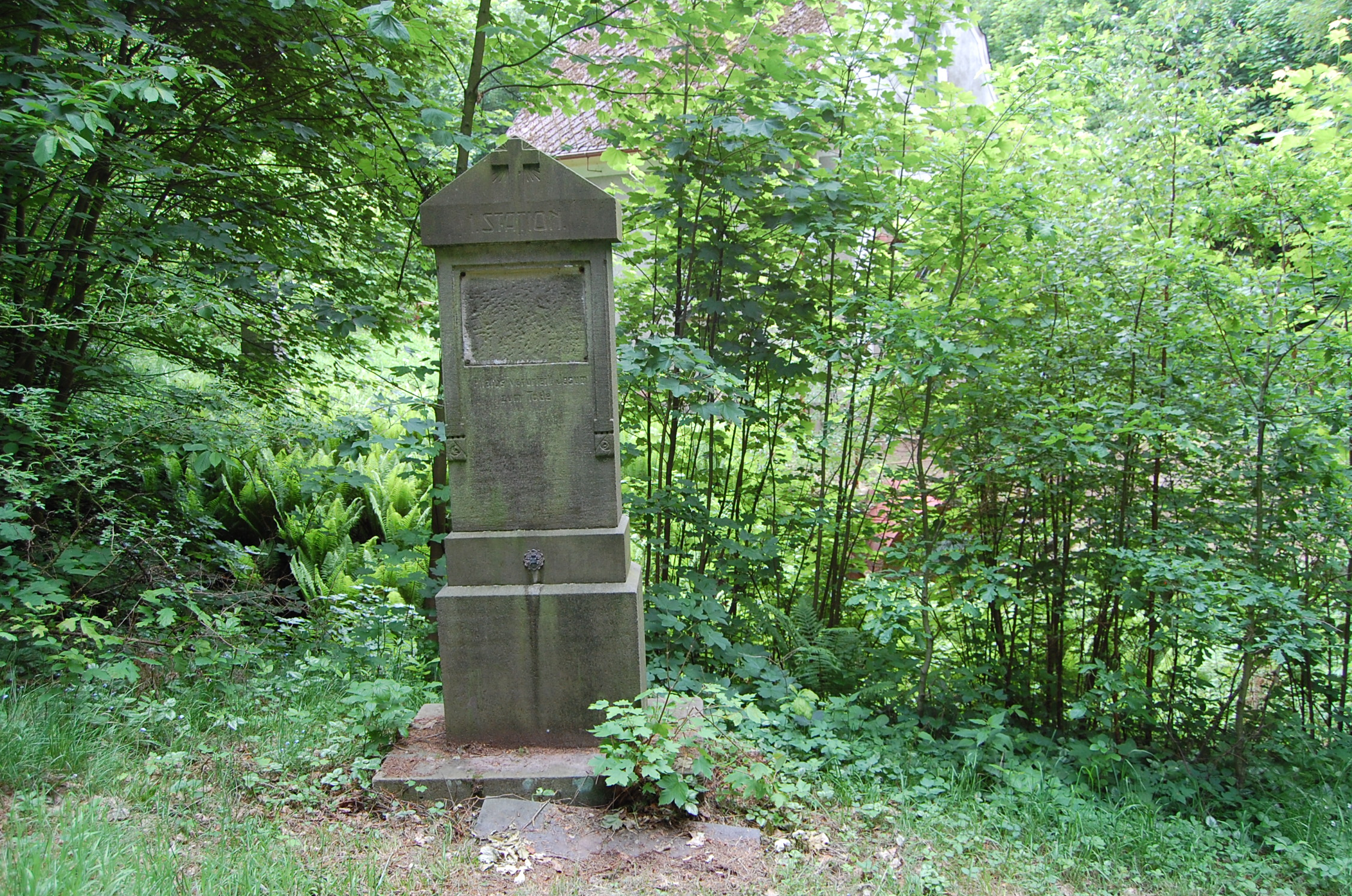 Stéla prvního zastavení